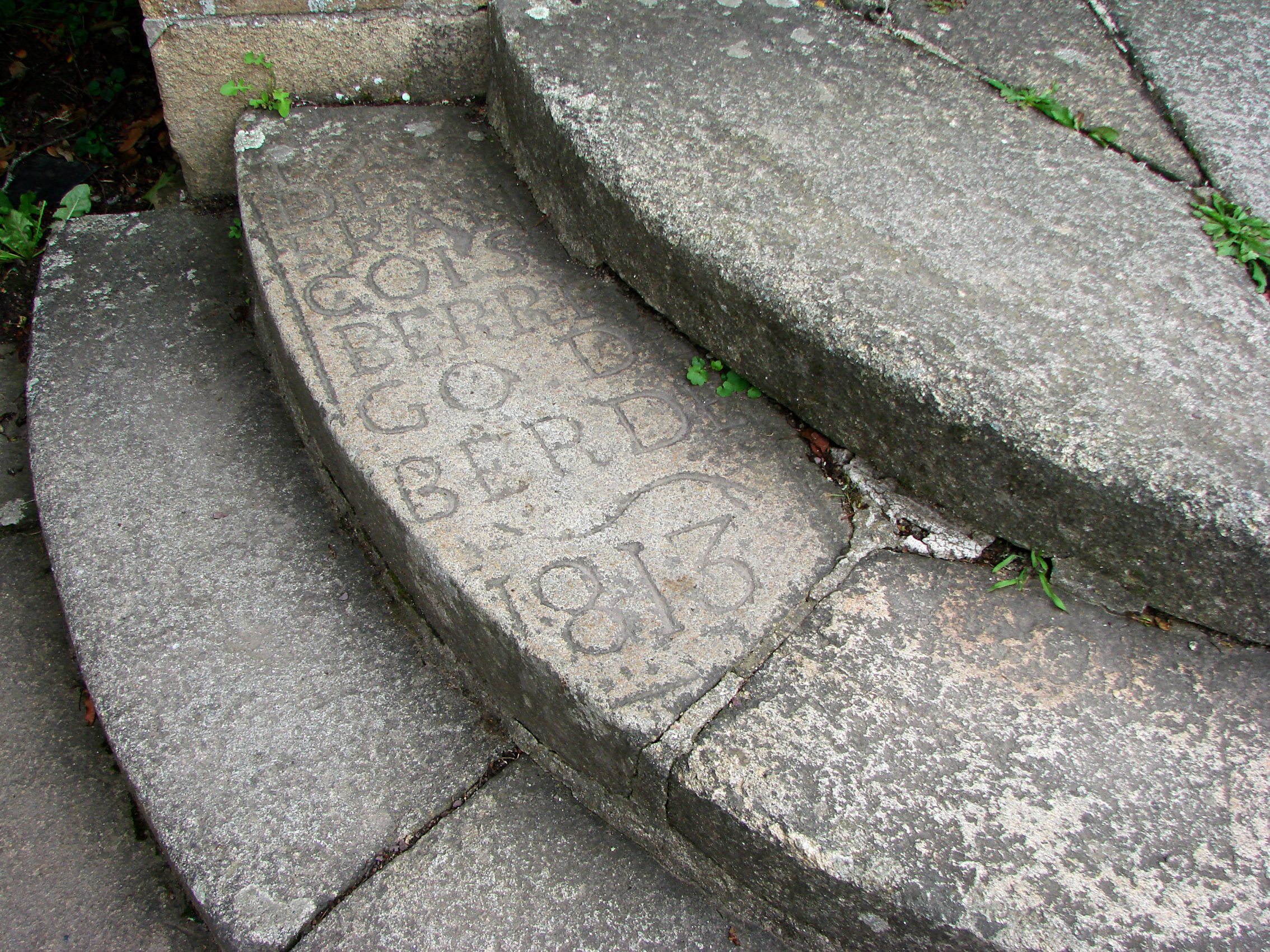 Baden (Morbihan, Bretagne, France) - Remploi, apparemment d'une pierre tombale, pour les marches de l'église St-Pierre.